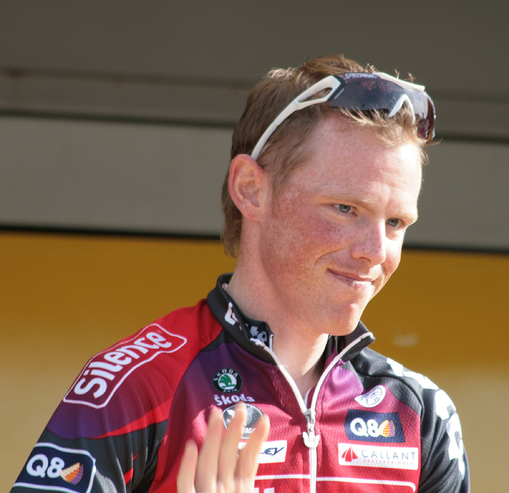 Christophe Brandt voor de start van Luik-Bastenaken-Luik 2008